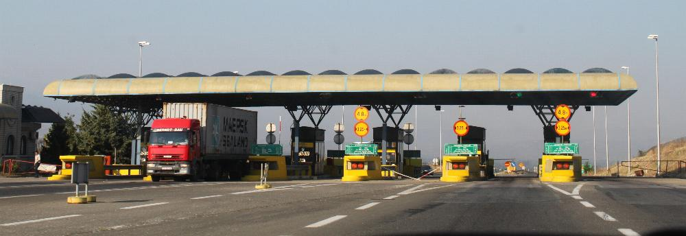 Mautstation an der M1 in Mazedonien